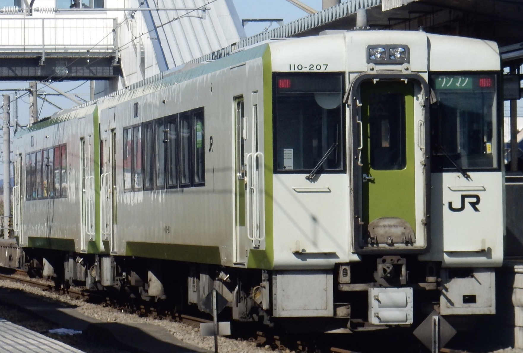 キハ110系207 八高線